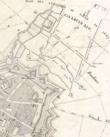 Extrait d'une carte établie en 1832 représentant le siège de Lille par Louis XIV